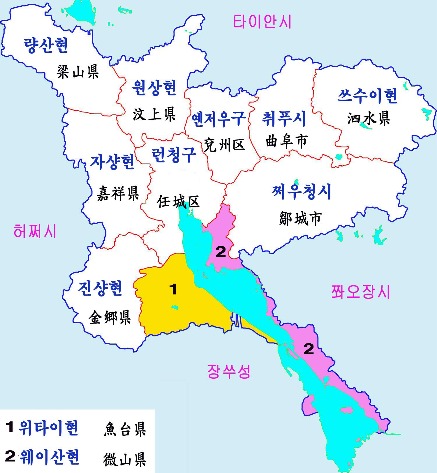 산둥성 지닝시 현급행정구역